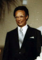 Tom Adams